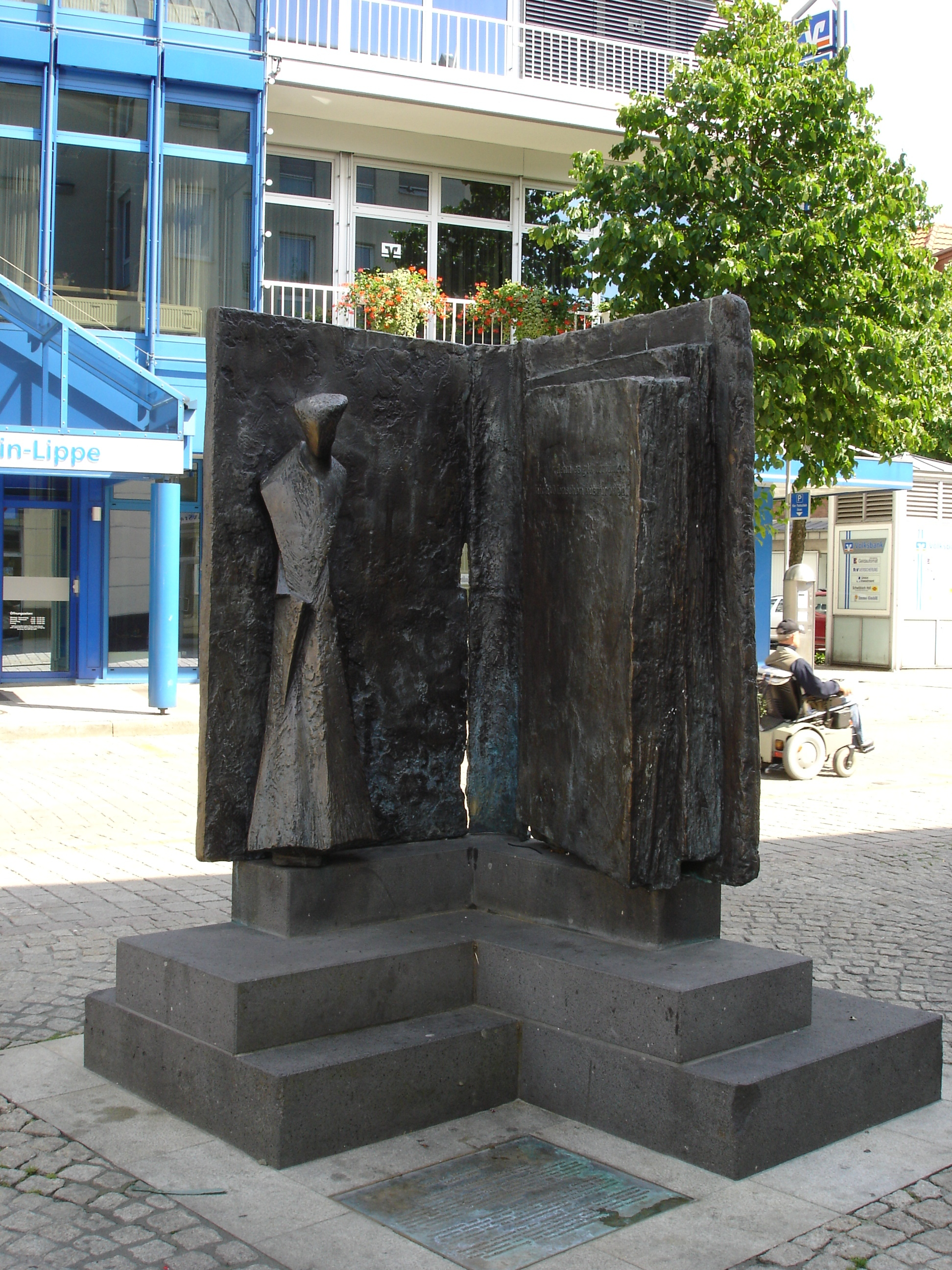 Heresbach-Denkmal in Wesel